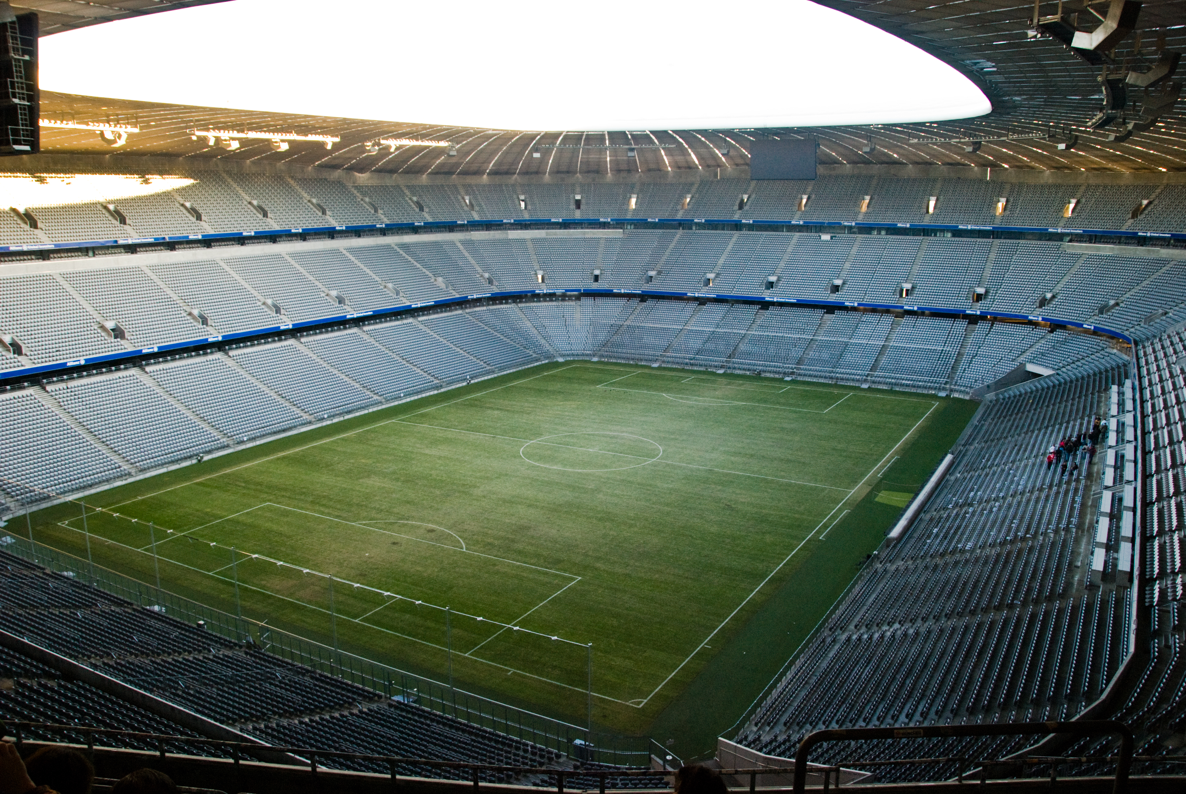 Allianz Arena, FC Bayern stadium in Munich